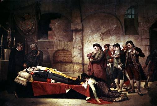 "Los cadáveres de Daoiz y Velarde en la cripta de San Martín", de Josep Nin i Tudó. Museo Municipal de Madrid, España.